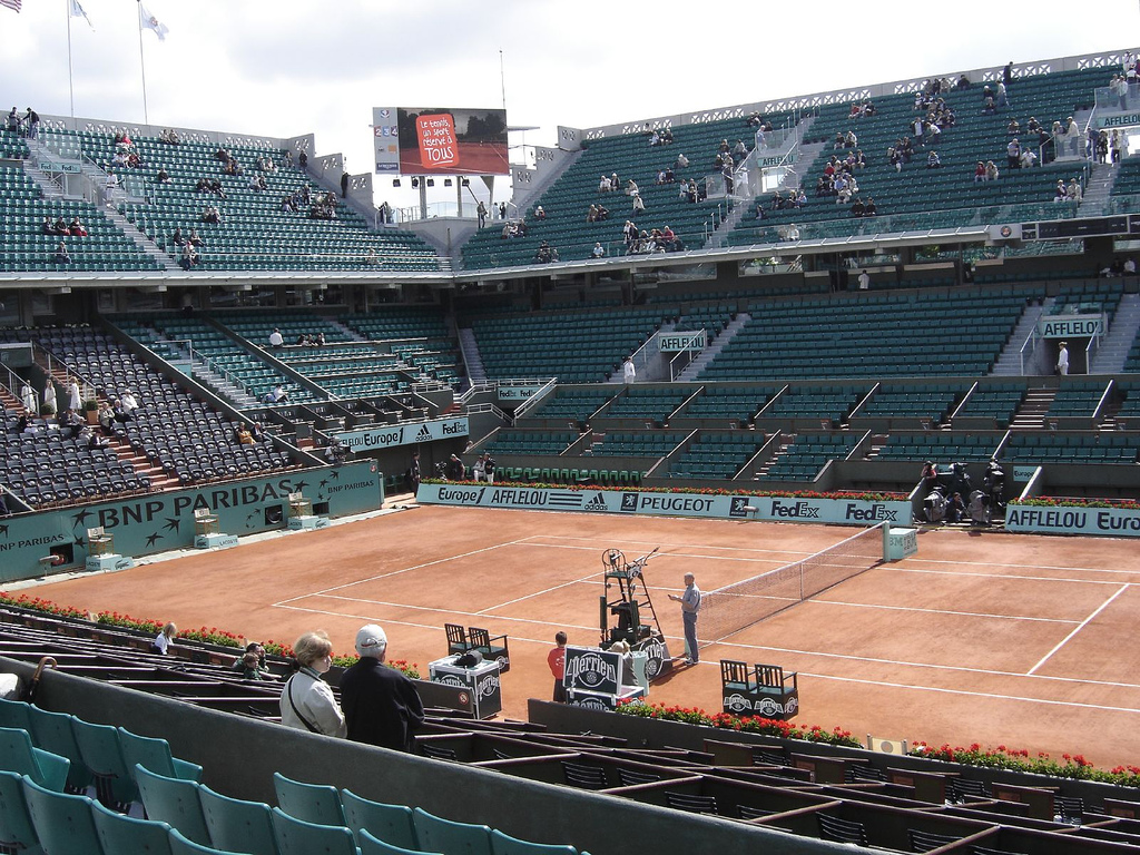 Internationaux de Roland Garros Paris 01/06/2007 court central Philippe Chatrier